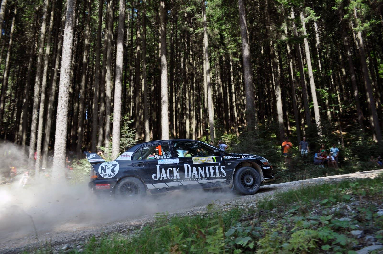 Maşina echipajului Gergo Szabo/Levente Csegy la Raliul Ţara Bârsei 2010